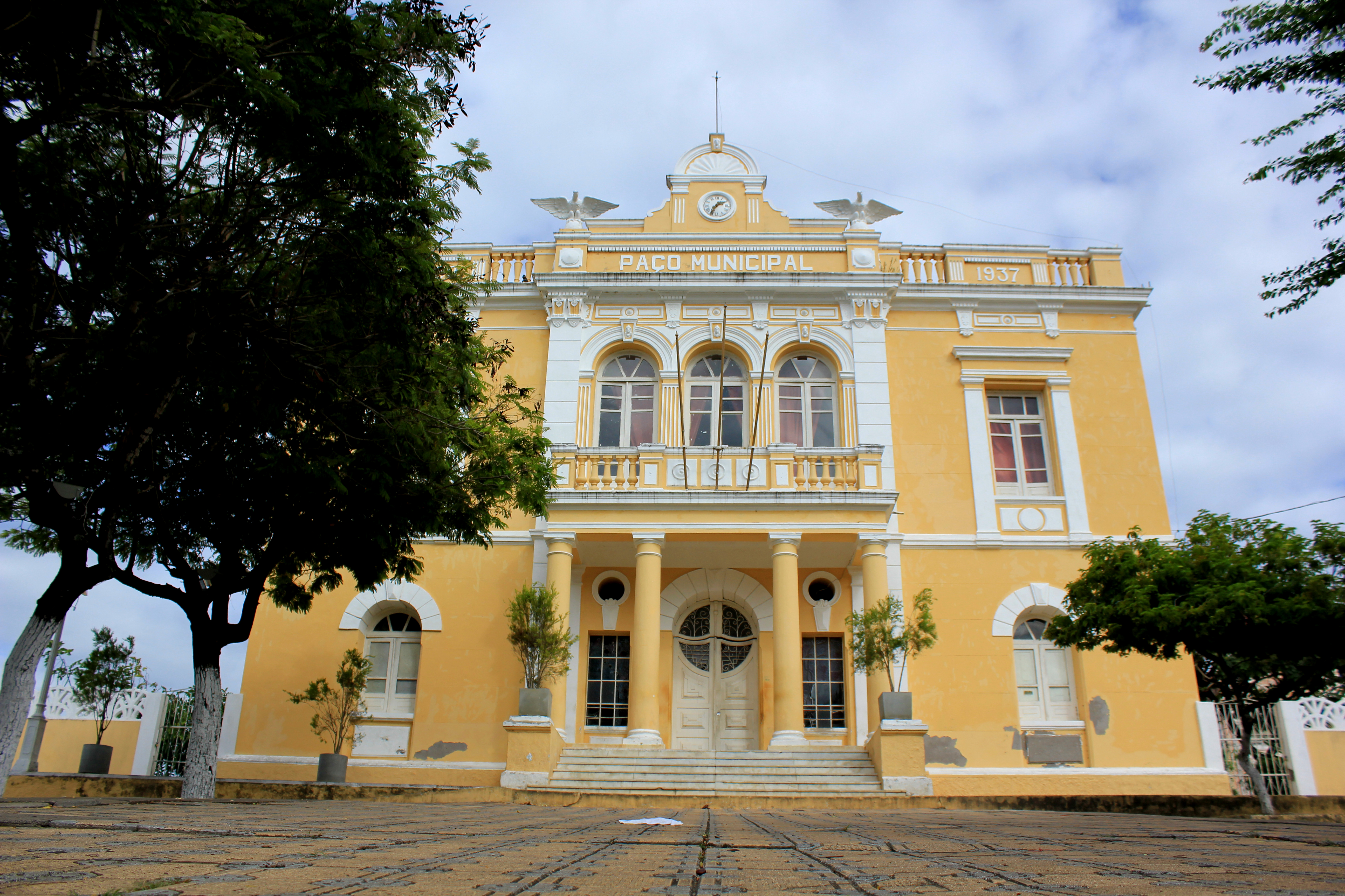 Paço Municipal. São Félix - Ba . Foto: Erica Almeida - Setur Cultural property Paço Municipal de São Félix, São Félix, Bahia, Brazil Q56697750